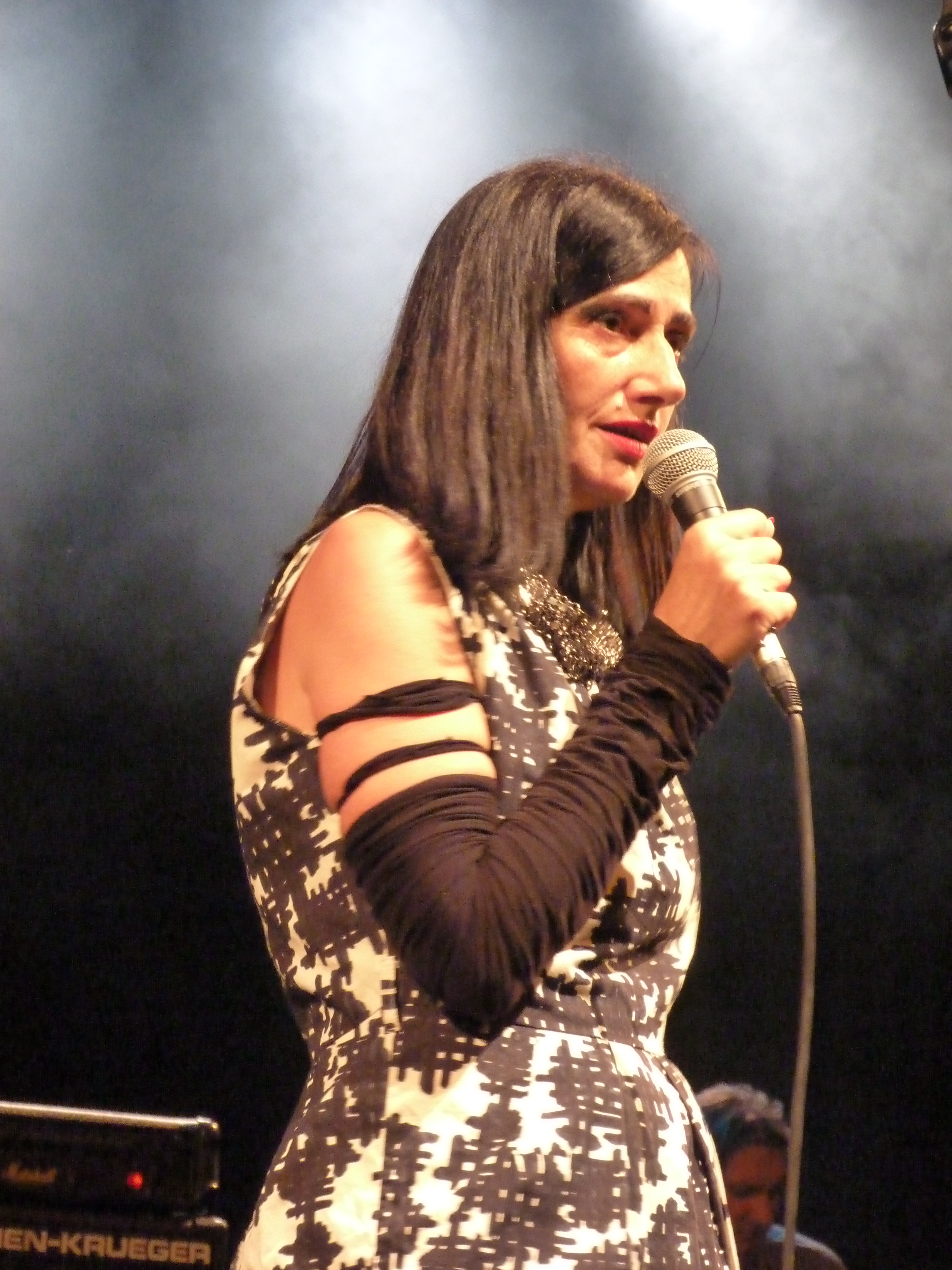 A felvétel 2013. Június hó 21 –én készült Budapesten, a Millenáris Teátrumban. Ági és a Fiúk zenekar. Bárdos Deák Ágnes (Bardó). A Kontroll Csoportból Hajnóczy Csaba és Hajnóczy Árpád. ©© Derzsi Elekes Andor, Budapest, 2013, A kép egészben, vagy részletekben másolását, bármilyen úton történő sokszorosítását és felhasználását a szerző ellenérték nélkül, jogutódjaira is kihatóan megengedi. Az engedély kiterjed a kereskedelmi célú hasznosításra is. Kéri azonban nevének feltüntetését a felhasználás során. A Metapolisz sorozat valamennyi képe és filmje Creative Commons alatti valamint kereskedelmi - for profit - célra is felhasználható. Ajánlott hivatkozás: Derzsi Elekes Andor: Metapolisz DVD line